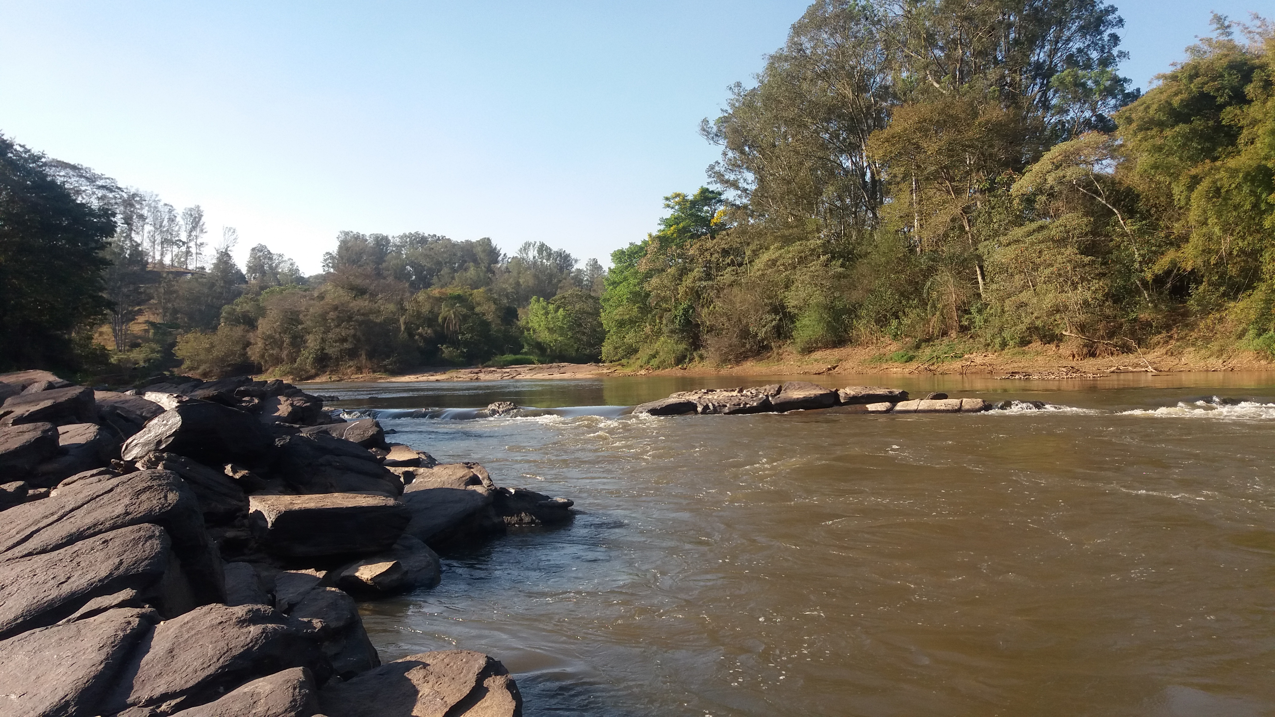 Trecho do Rio Verde logo abaixo a antiga PCH Boa Vista I em Varginha, em época de seca. Foto tirada em 16 de setembro de 2017.